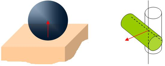 Schéma dont je suis l'auteur. Cours de mécanique. Catégorie:schéma cinématique